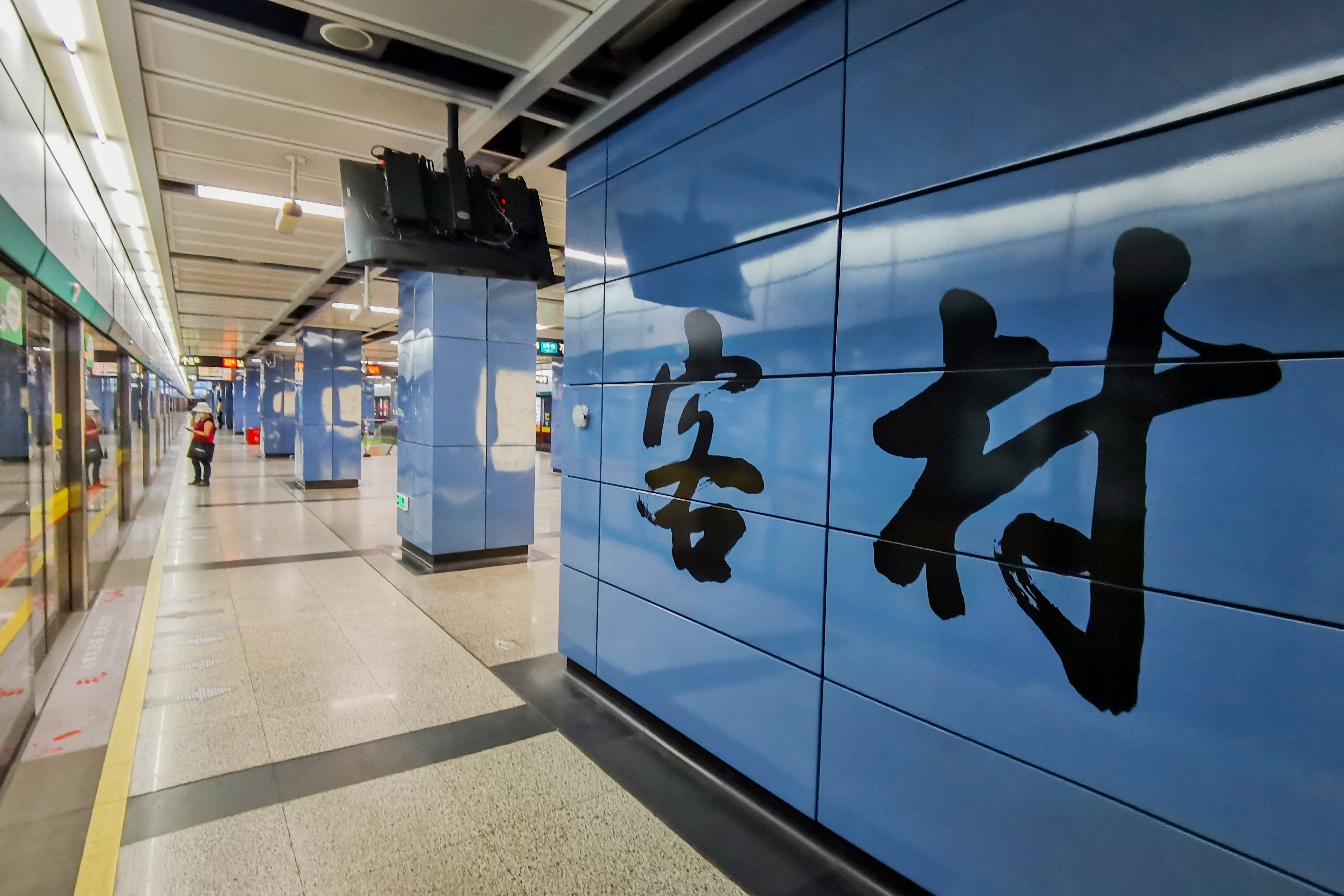 广州地铁客村站